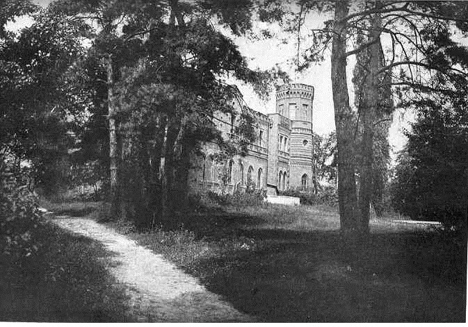 Україна. Стара Основа (колишня слобода Основа). Світлина з книги "Старовинні маєтки Харківської губернії", Лукомського Г.К.